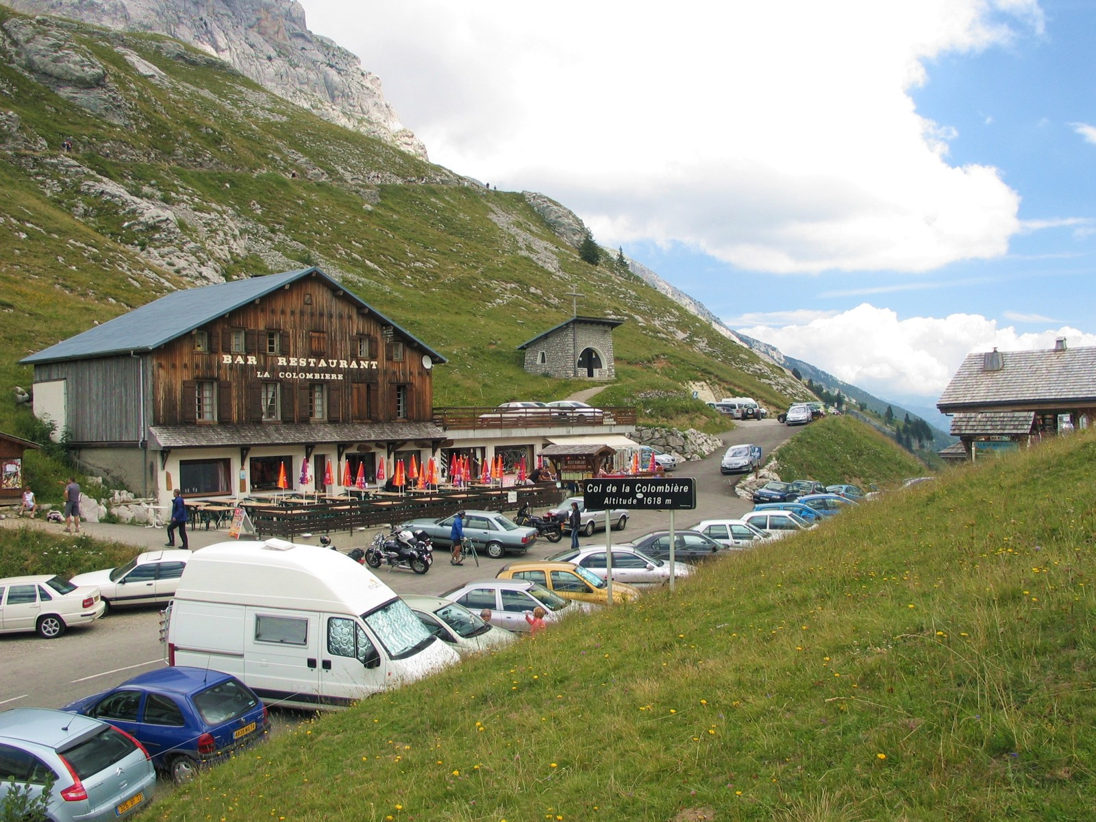 Passhöhe du Col de la Colombière